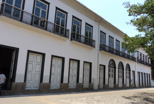 Solar Valim fica na cidade de Bananal, Estado de São Paulo e pertenceu ao Barão Manoel de Aguiar Valim, e teve seu apogeu no ciclo do Café, no Século XIX.